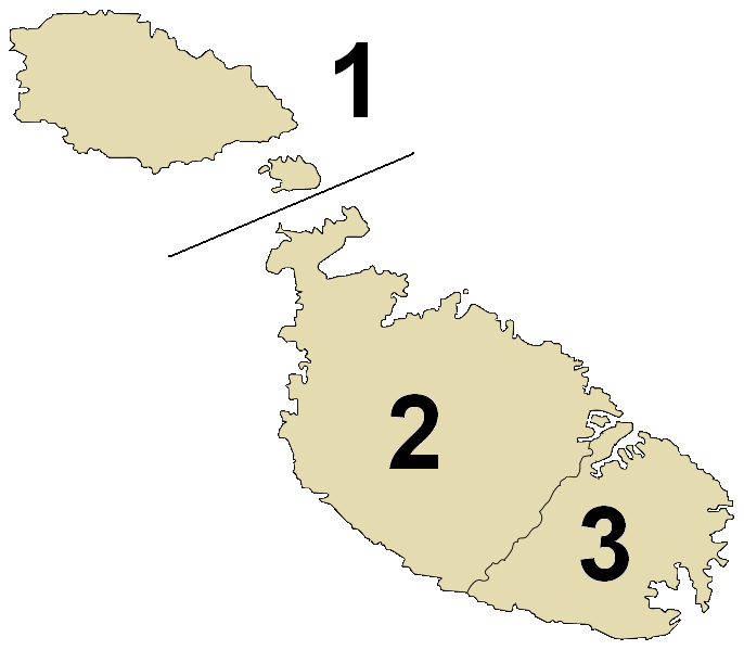 Regiones maltesas.